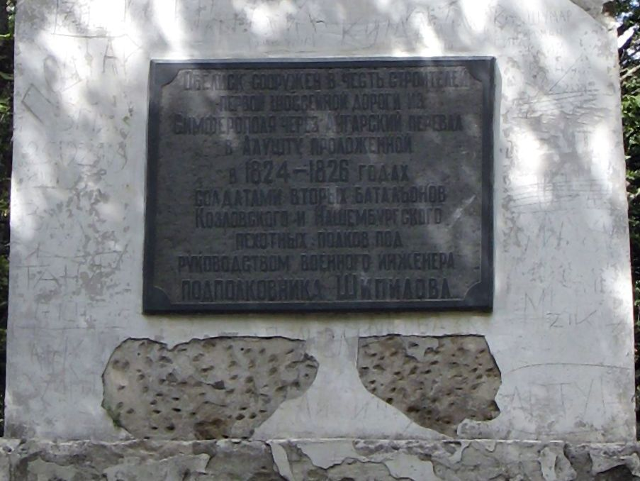 Памятный знак в честь окончания строительства дороги Симферополь-Алушта. Надпись гласит: "Обелиск сооружен в честь строителей первой шоссейной дороги из Симферополя через Ангарский перевал в Алушту, проложенной в 1824-1826 годах солдатами вторых батальонов Козловского и Нашембургского пехотных полков под руководством военного инженера подполковника Шипилова".